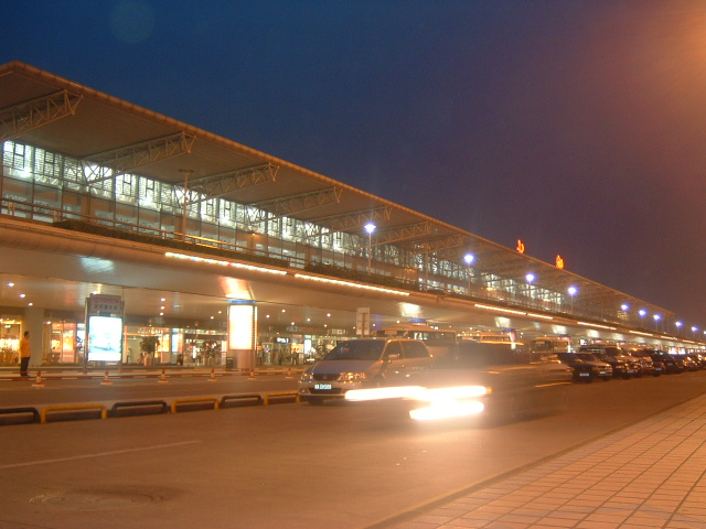 成都双流国际机场